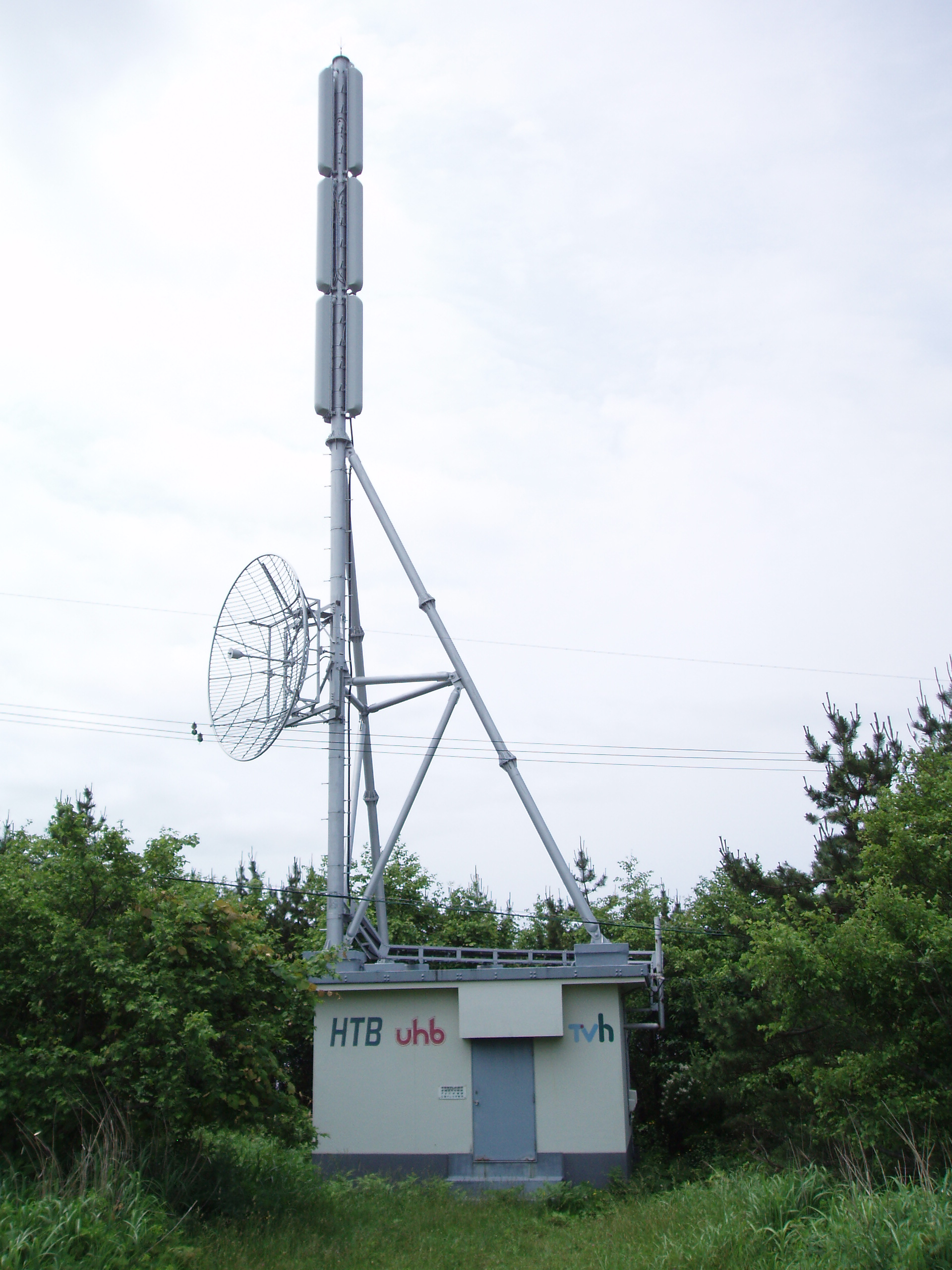 江差中継局 HTB・UHB・TVh送信設備